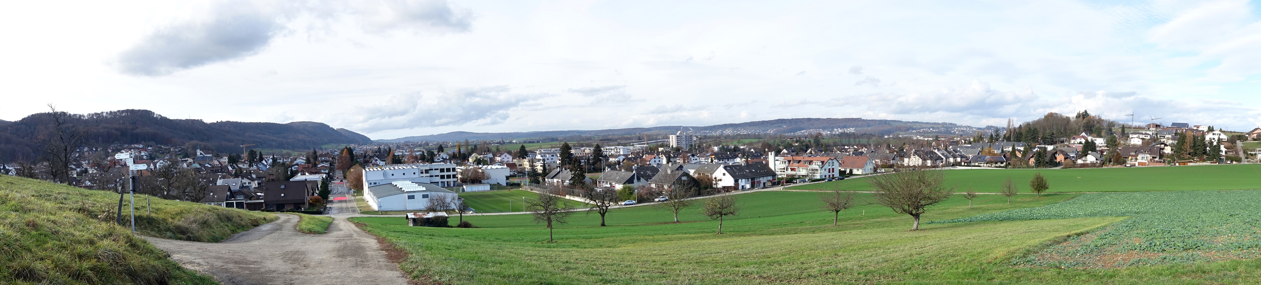 Panorama von Ettingen